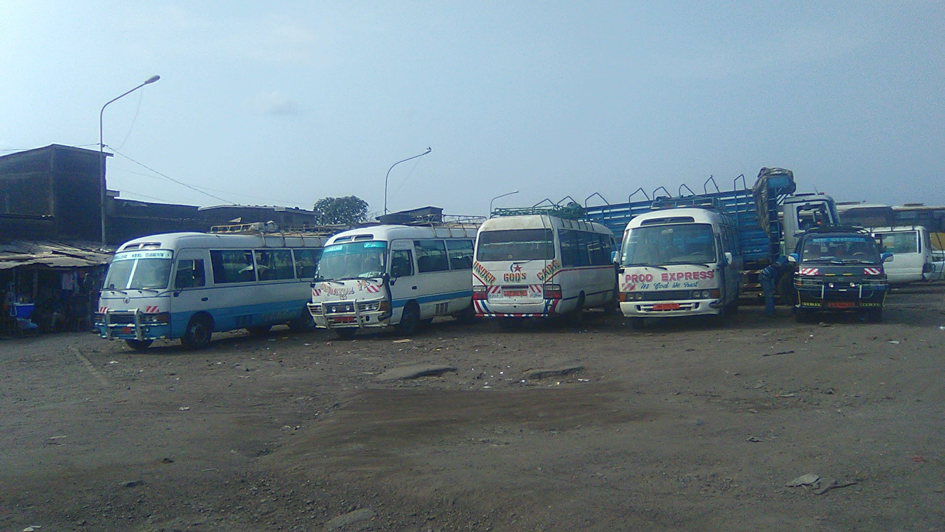 Les transporteurs qui n'ont pas de site propre pour construire leurs agences s'installent dans des gares routières créées par les communes pour mieux contrôler les acteurs du transport et limiter les embouteillages liées aux embarcations et chargements en bordure de la route. Ici la gare routière de Dschang. This is an image with the theme "Africa on the Move or Transport" from: Cameroon